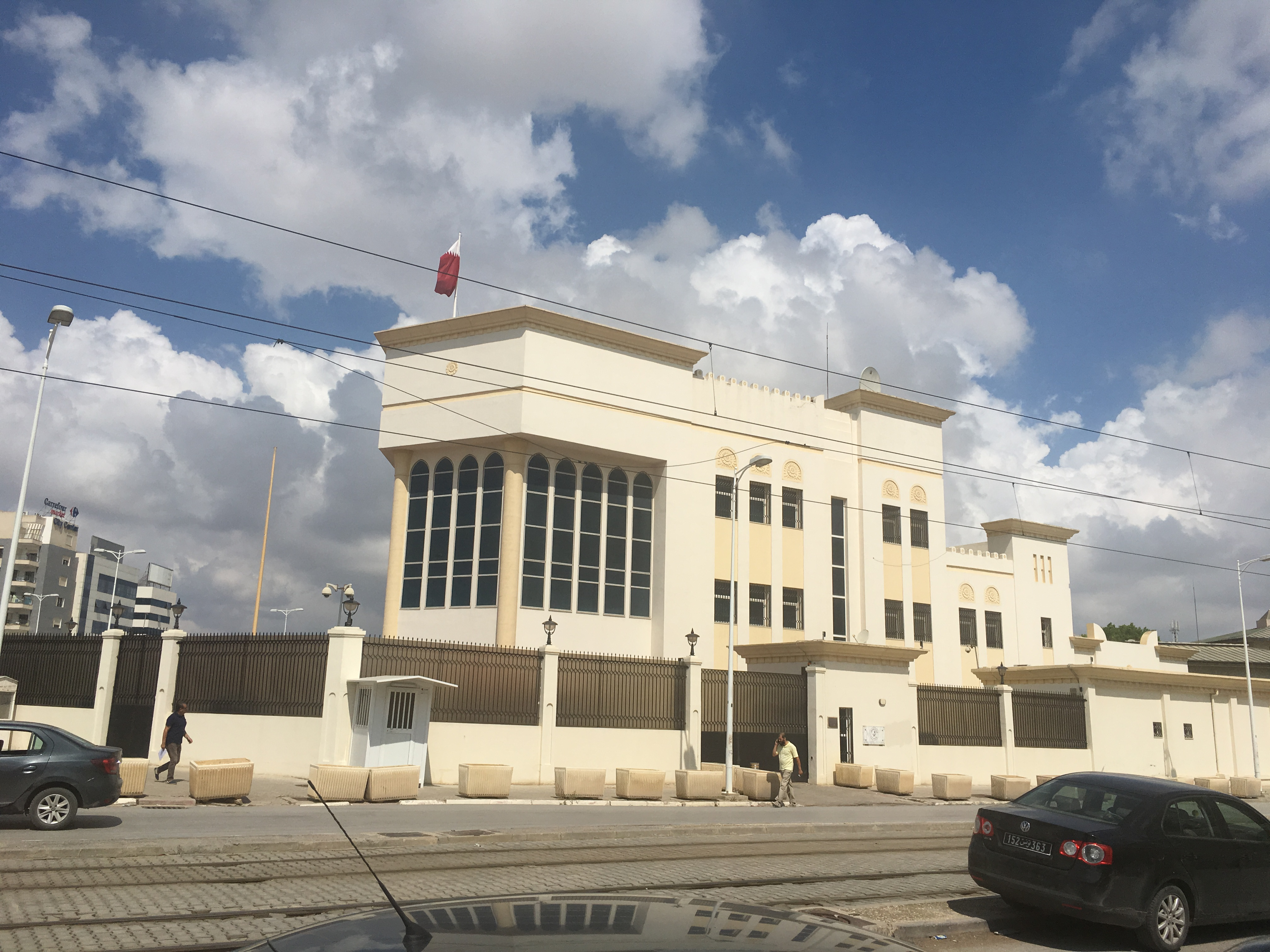 Ambassade du Qatar en Tunisie, 2019.